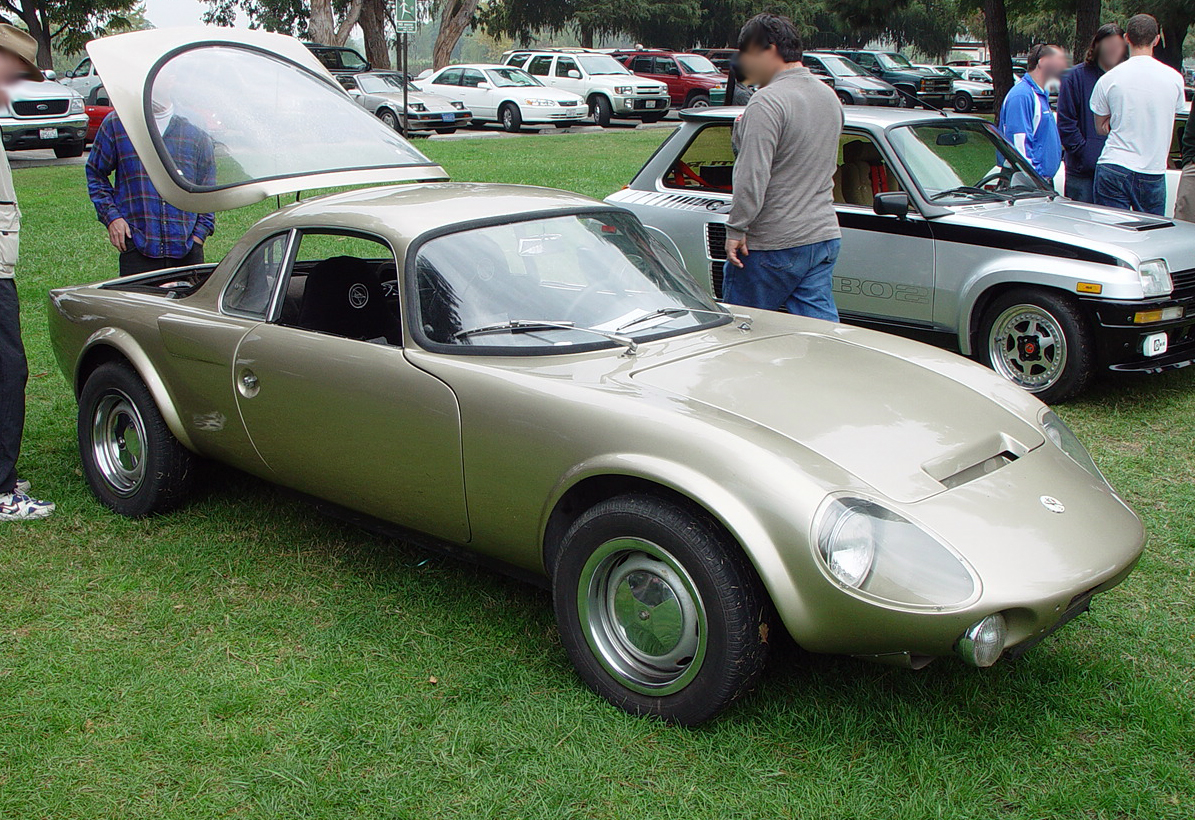 1964 or 1965 Matra-Bonnet Djet V.S